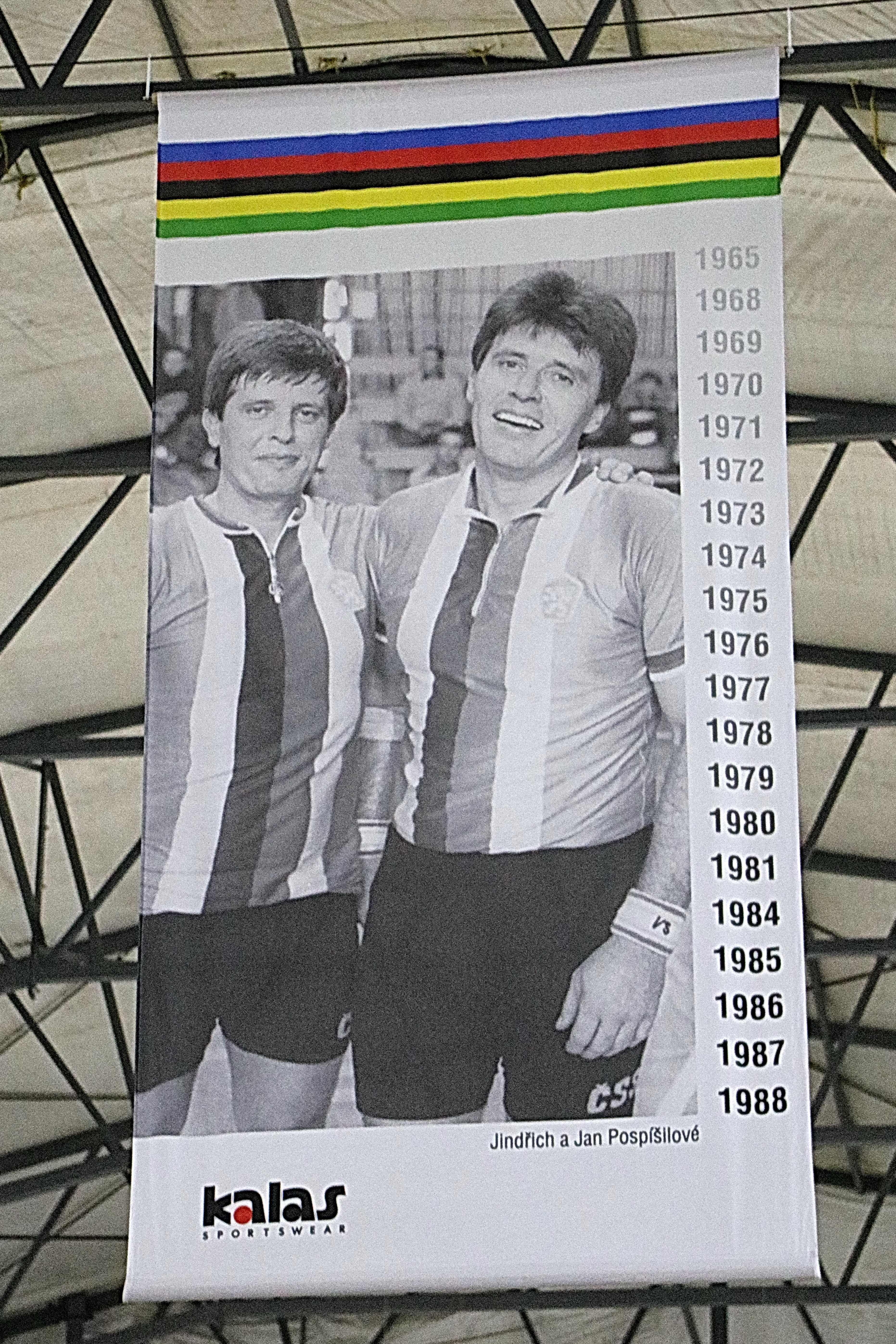 Bratři Jindřich a Jan Pospíšilové, nejlepší hráči kolové v historii (20 titulů mistrů světa). Síň slávy ČSC - portrét pod střechou velodromu v Praze v Motole.